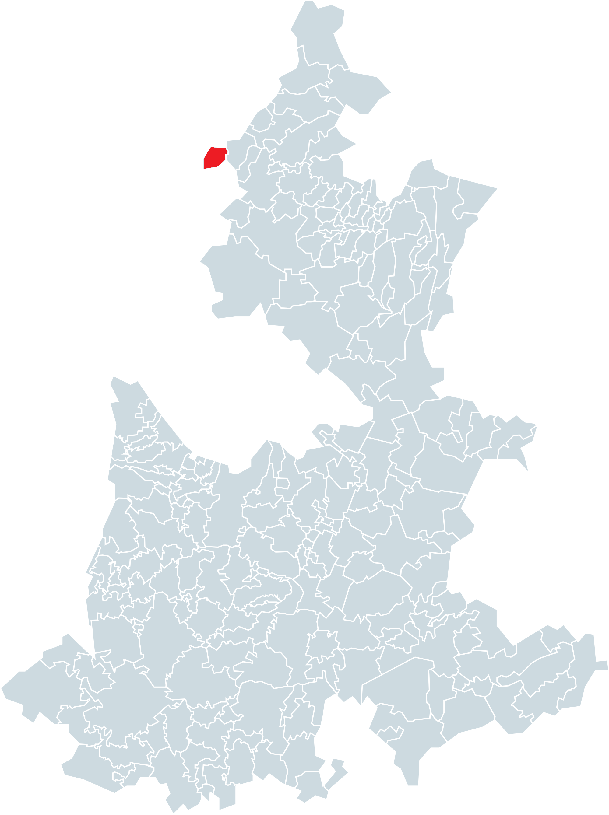 Municipio de Honey